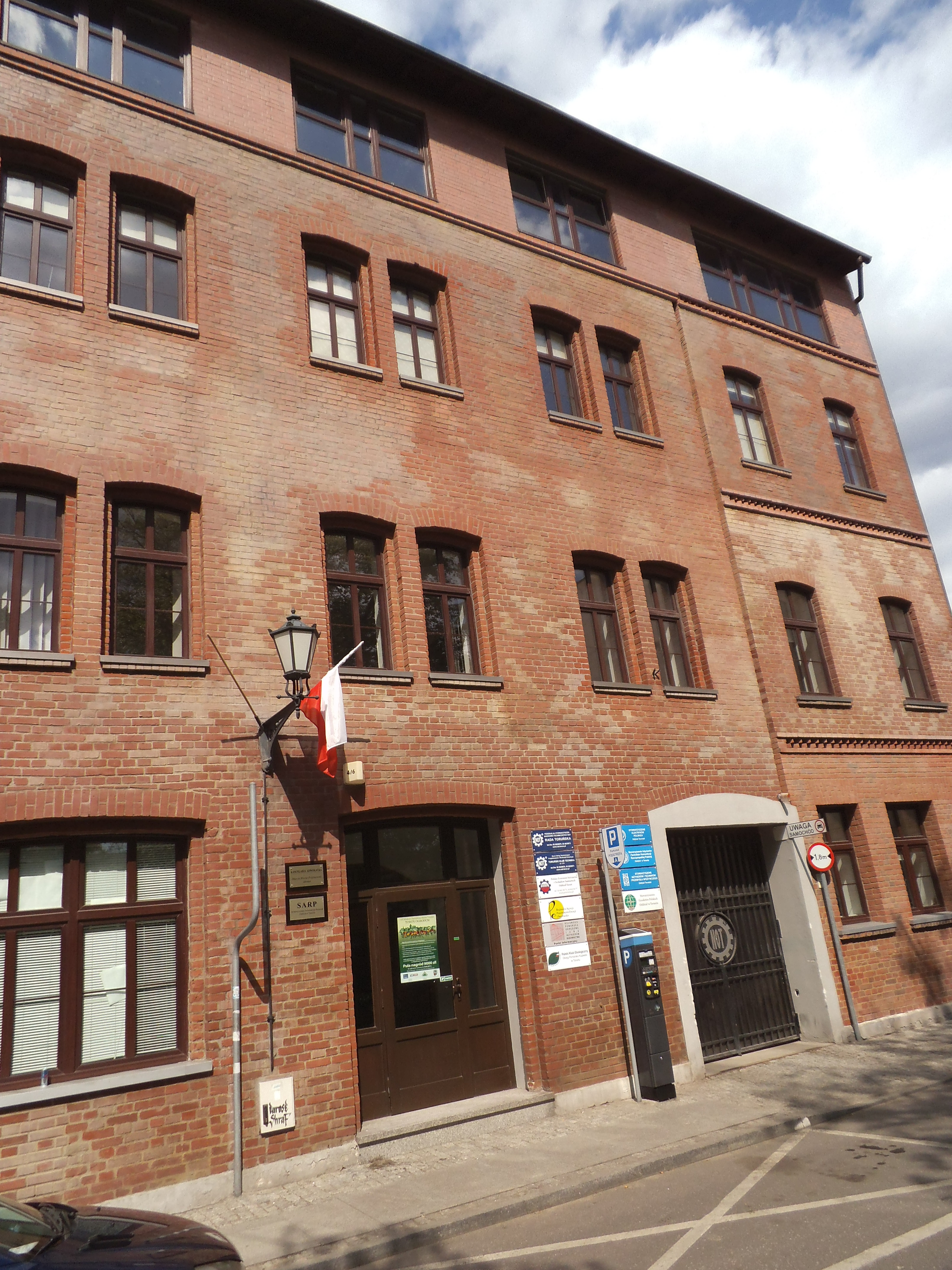 Naczelna Organizacja Techniczna w Toruniu